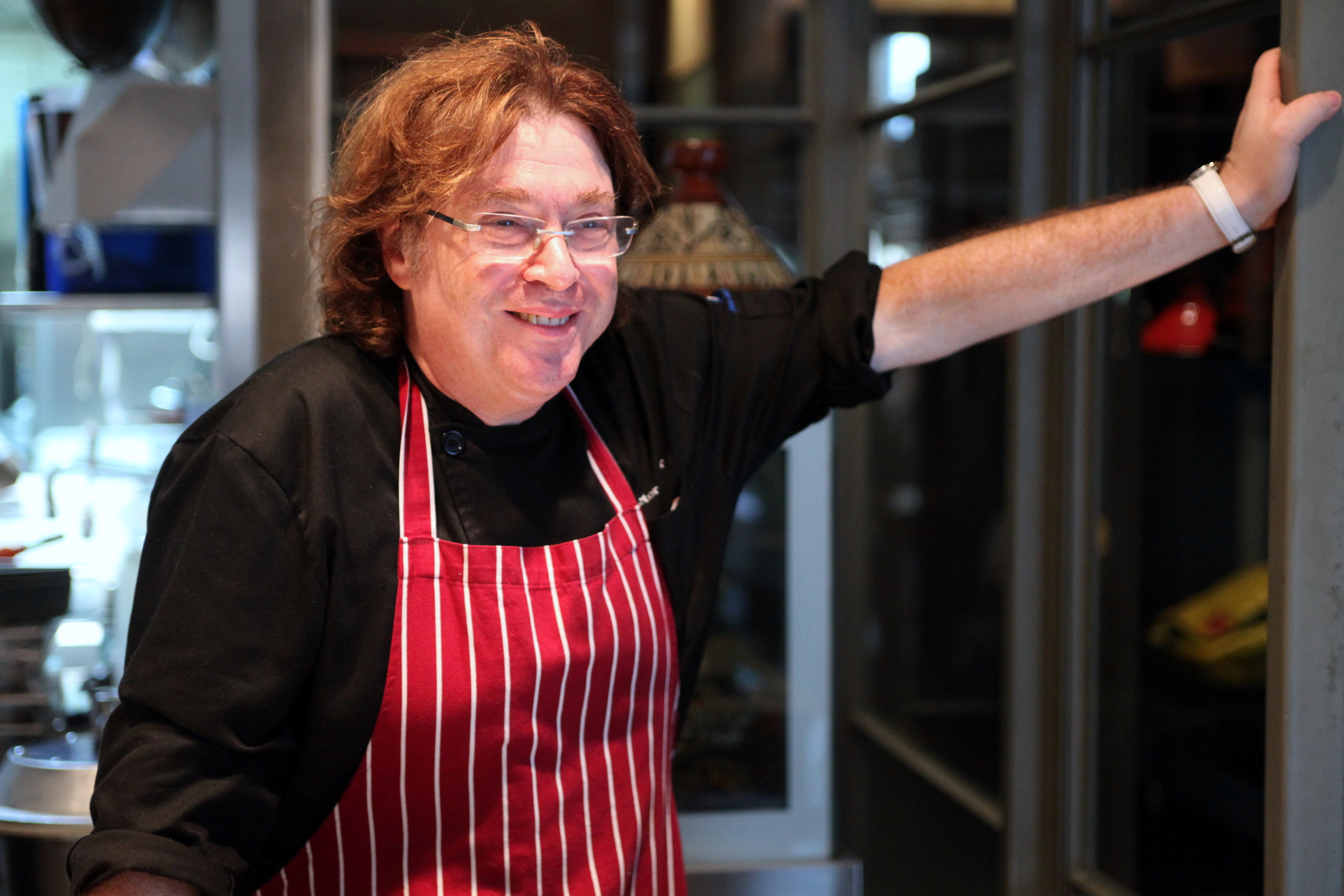 Victor Gloger in Chloelys